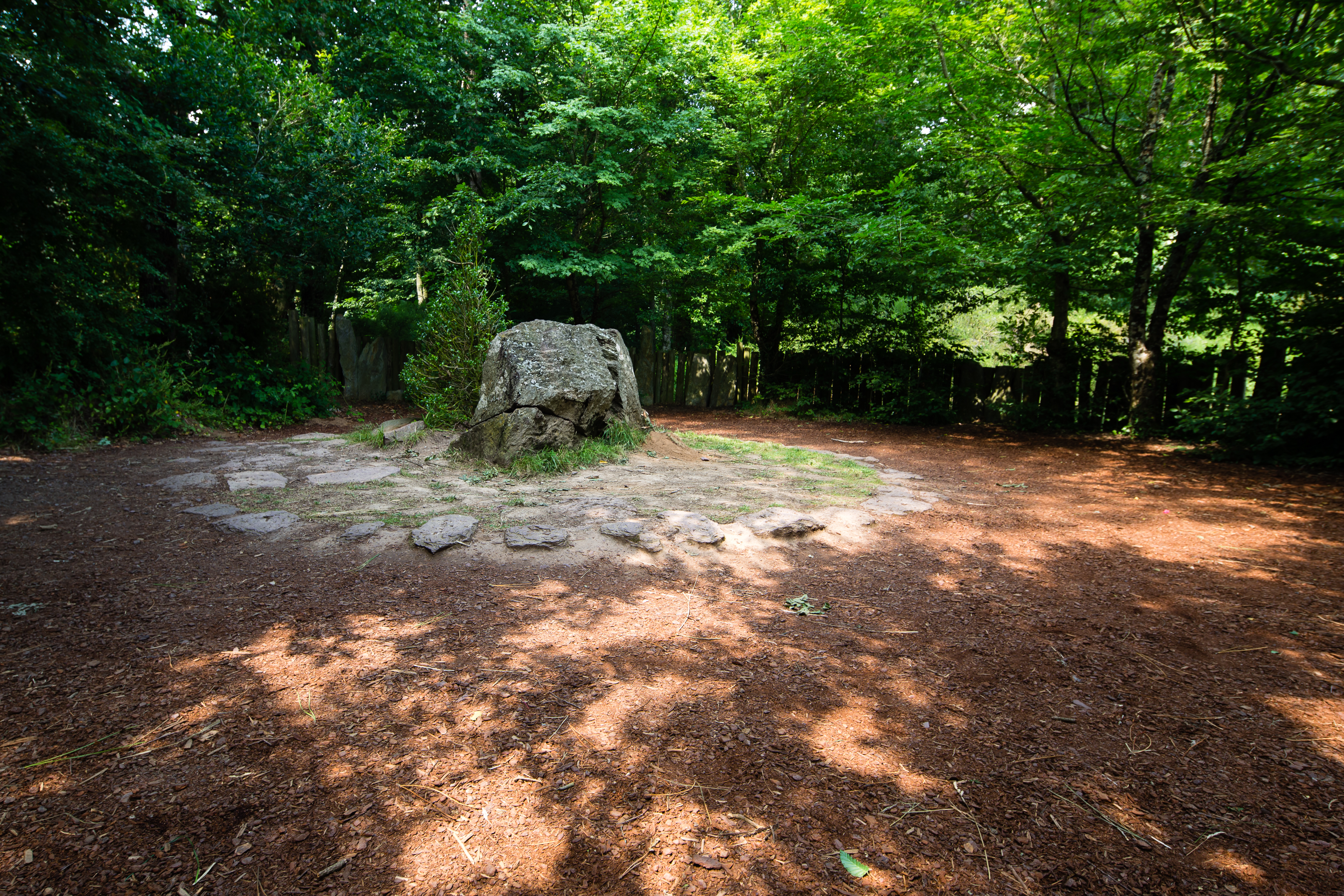 Allée couverte dite « le tombeau de Merlin » à Paimpont (France).